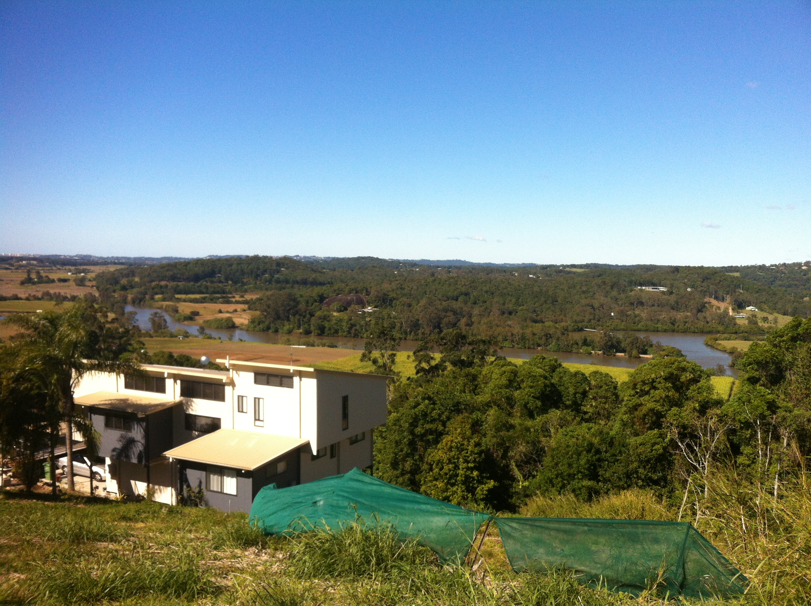 Mt. Ninderry